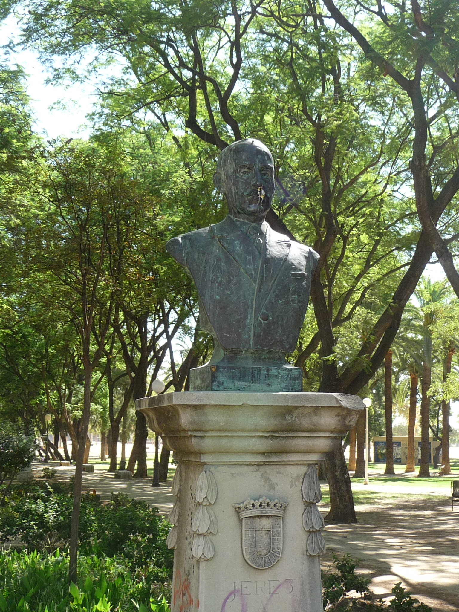 Monumentos-Jerez--P1040523.JPG